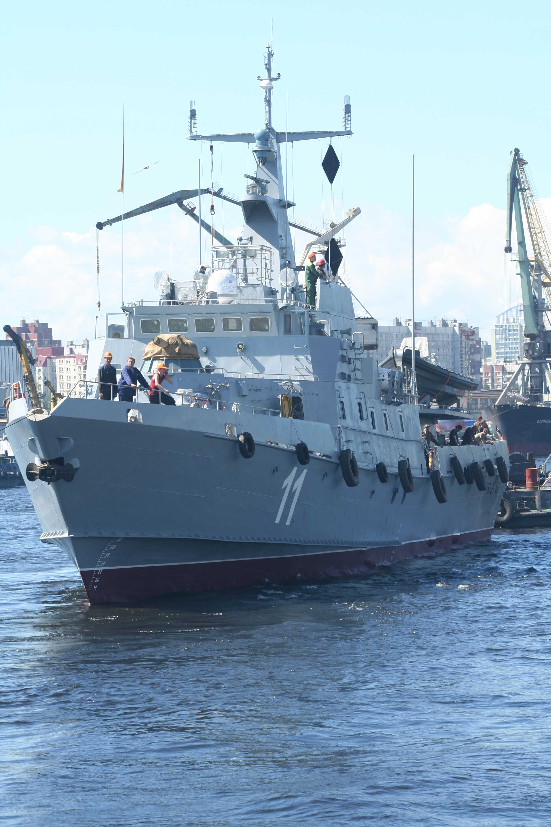 Patrol boat Triglav.